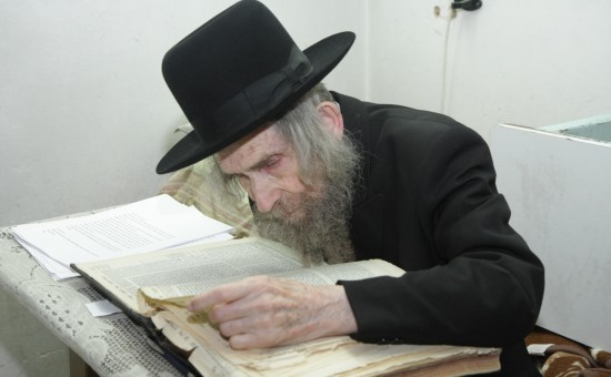 הרב שטיינמן בלימודו מעיין בספר